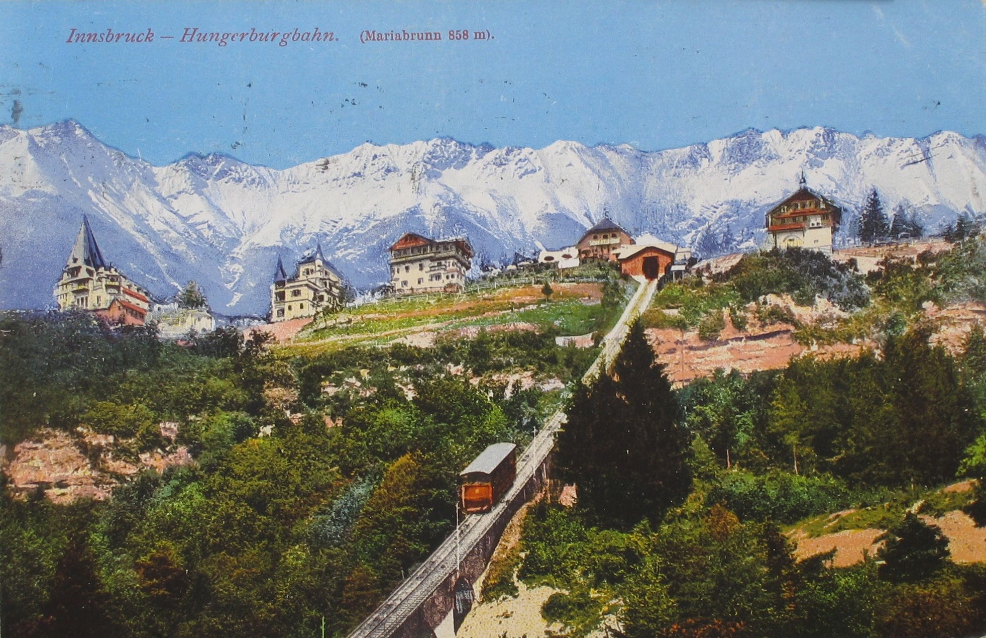 Innsbruck, Hungerburgbahn, Mariabrunn 858 m. Postkarte mit Poststempel 28.7.1927